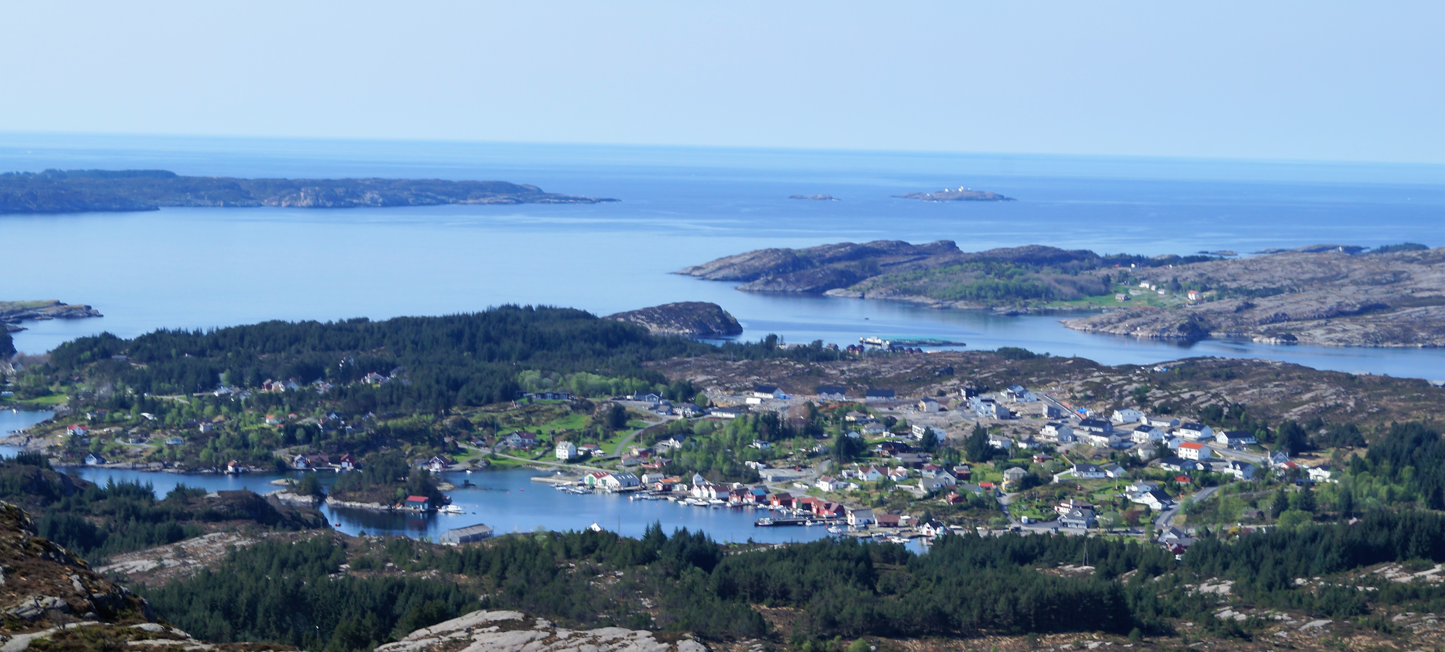 Forlandsvåg sett fra fjelltoppen Kleppaksla